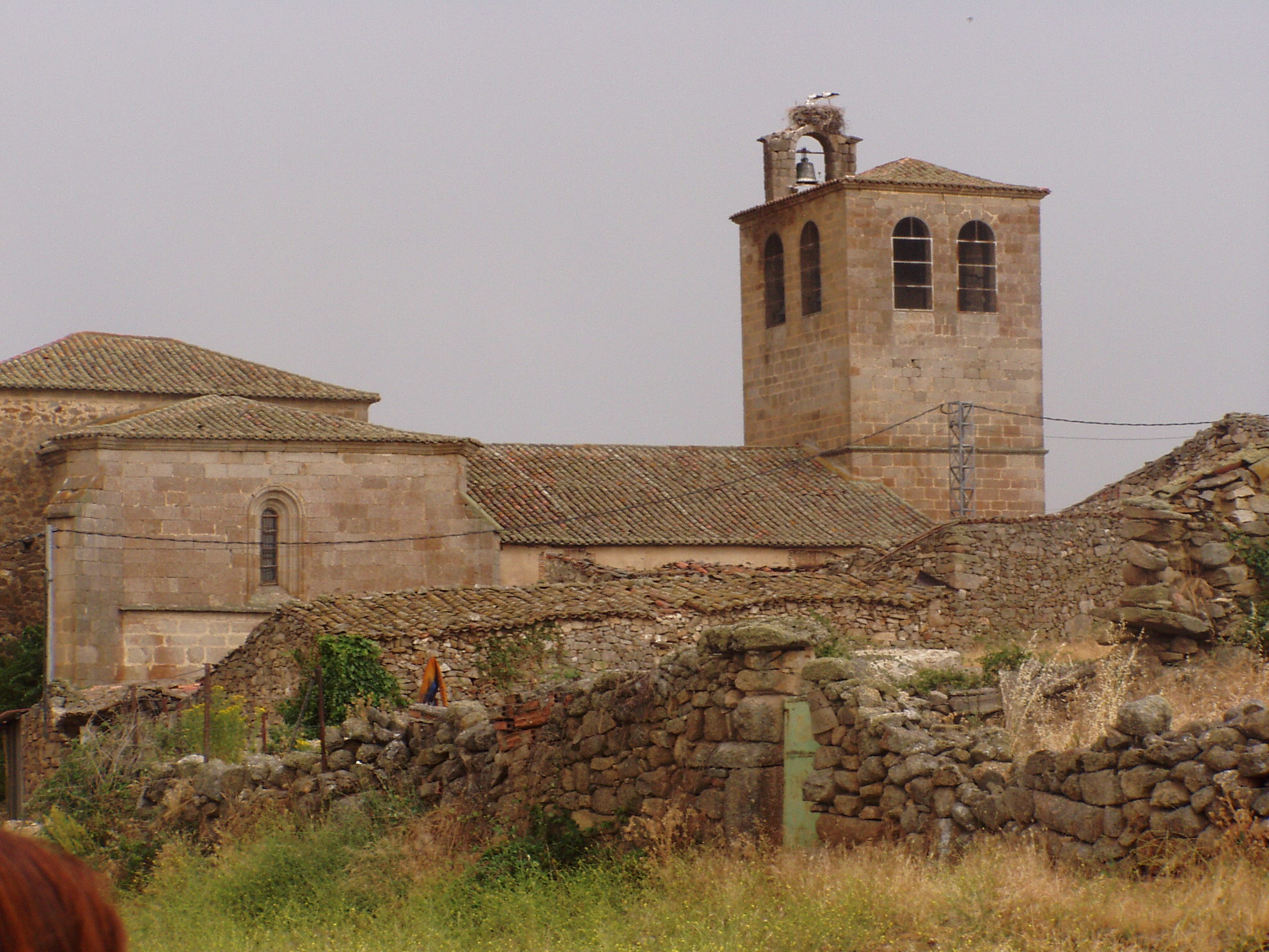 Iglesia de la villa salmantina de Puente del Congosto